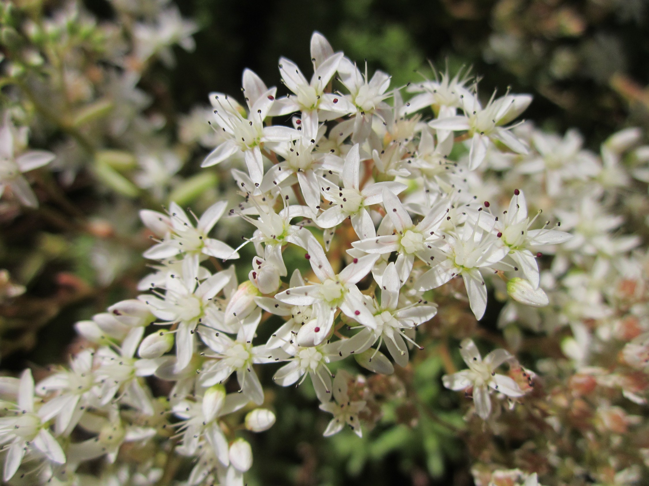 Weiße Fetthenne (Sedum album) im Schwetzinger Hardt